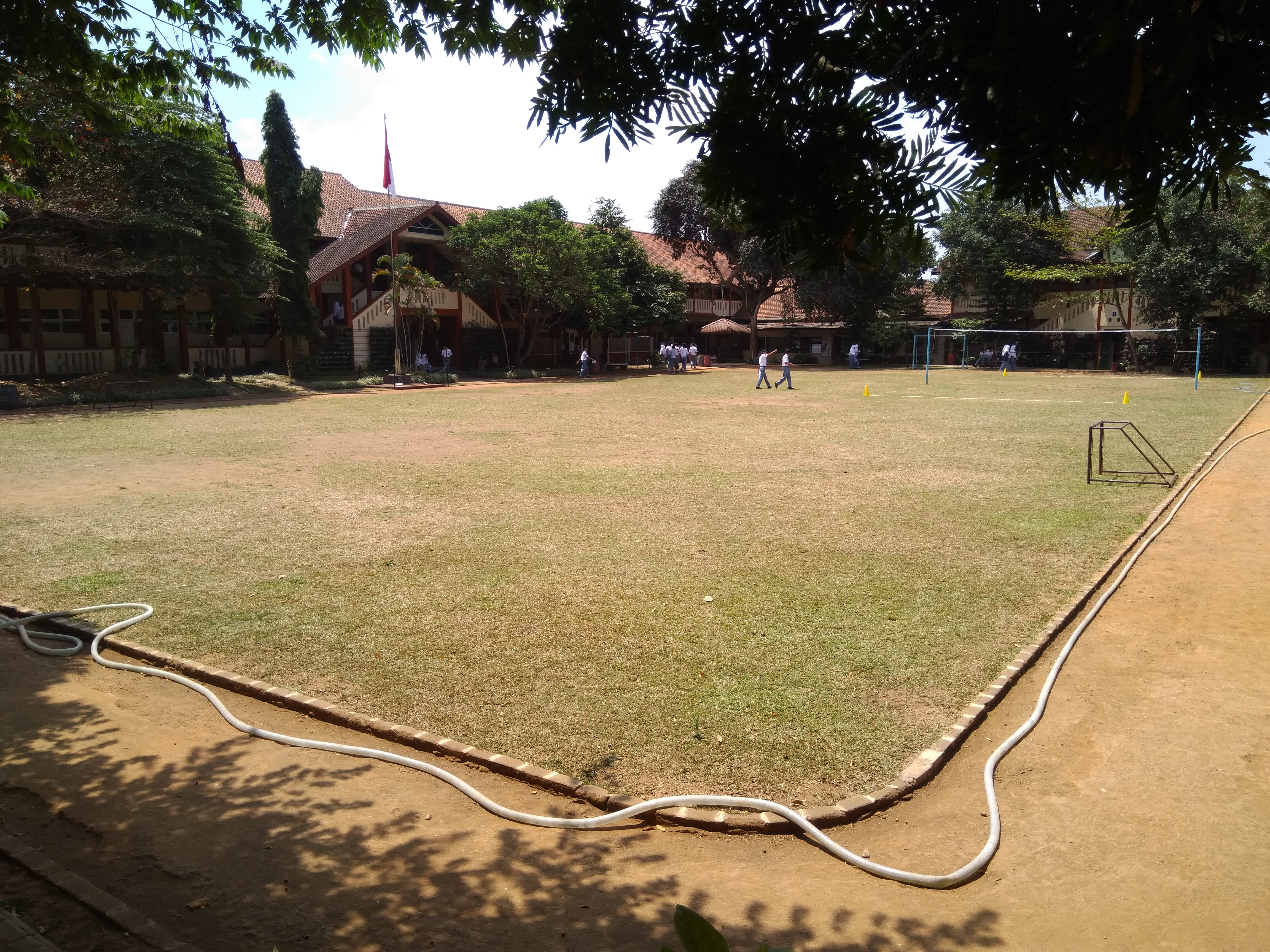 Lapangan Upacara SMA Negeri 1 Salatiga.